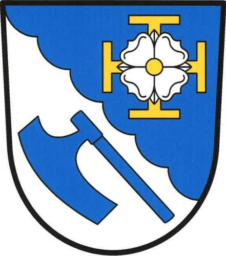 Svaté Pole znak